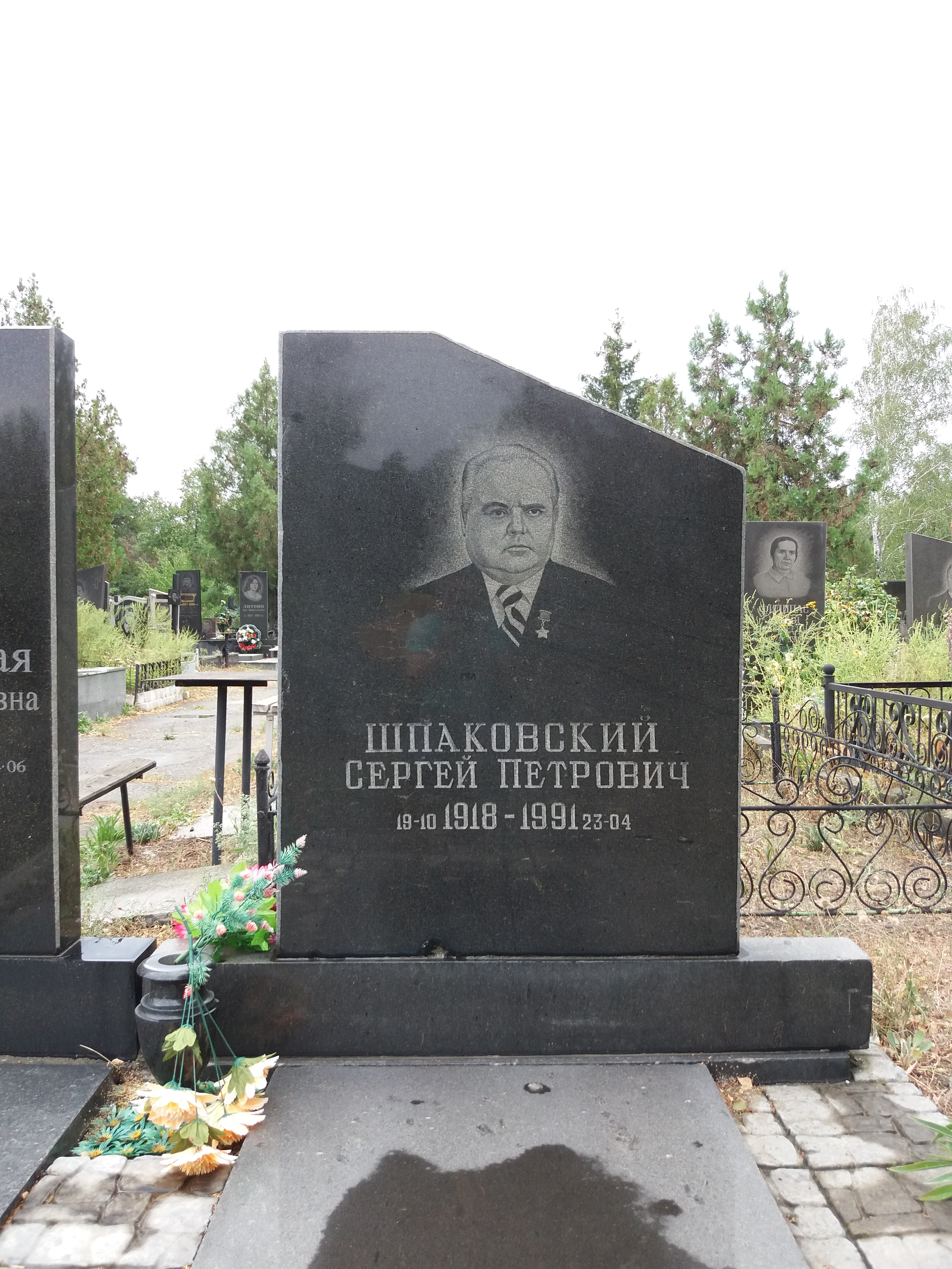 Могила Героя Радянського Союзу С. П. Шпаковського, Кременчук, нове міське кладовище